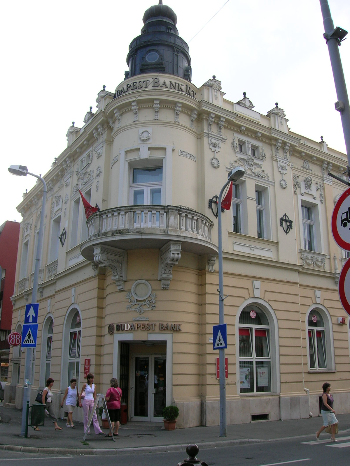 Zalaegerszeg, Hungary.